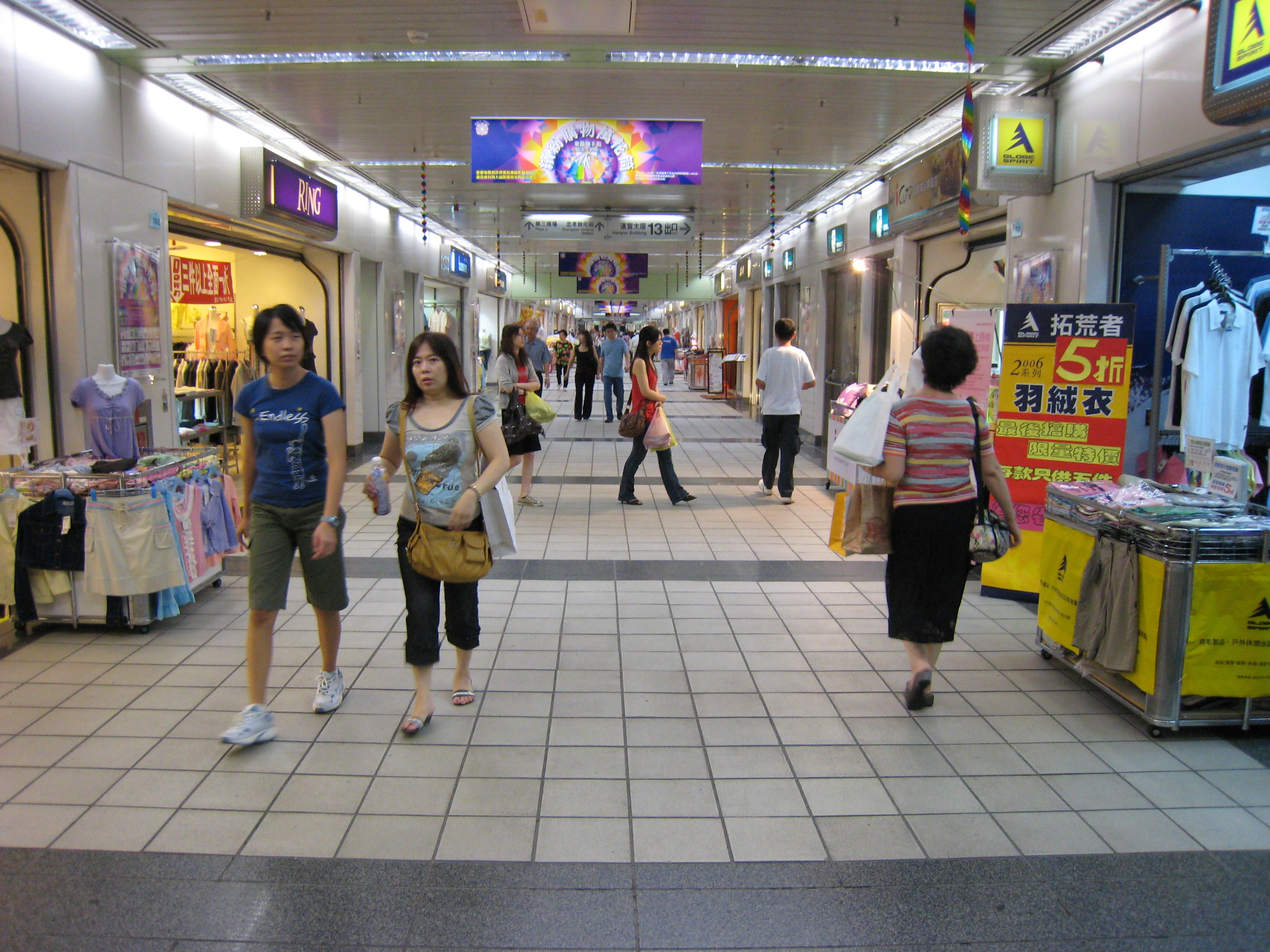 東區地下街13號出口附近。